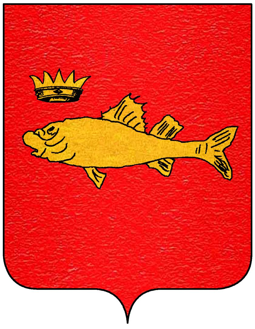 Stemma della famiglia Balbiano